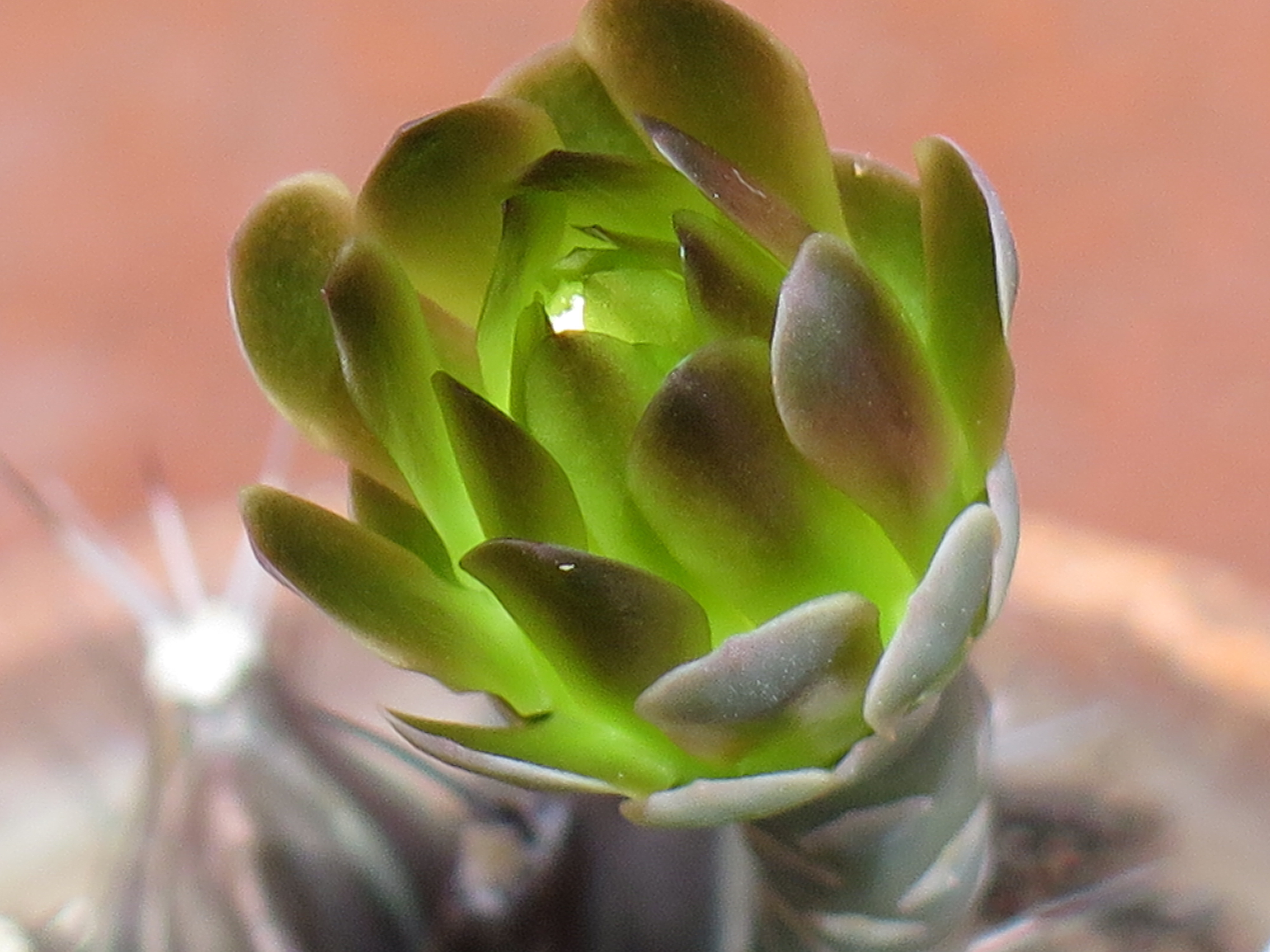 Gymnocalycium mihanovichii - un fiore